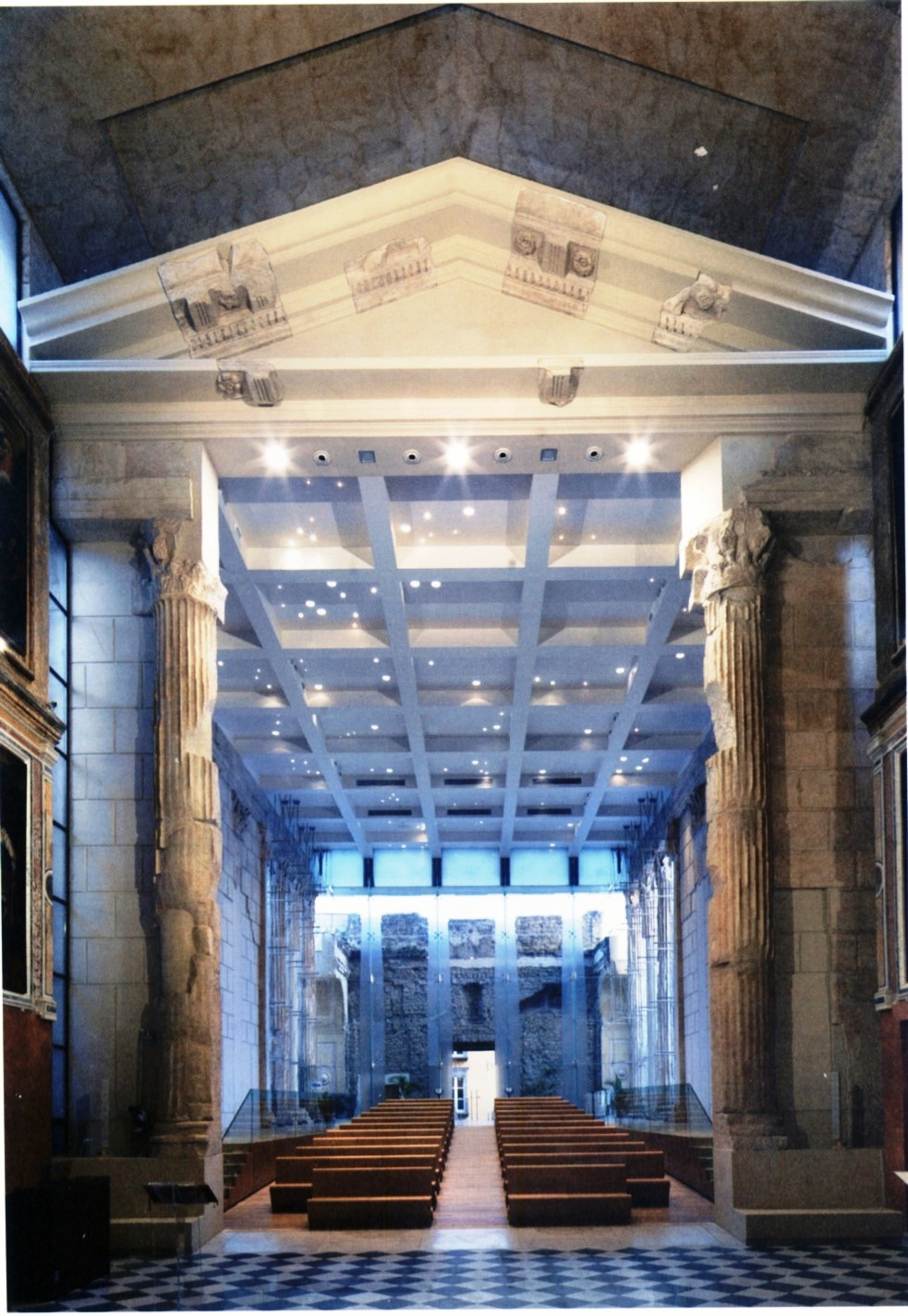 Tempio romano e Basilica Cattedrale di San Procolo martire di Pozzuoli